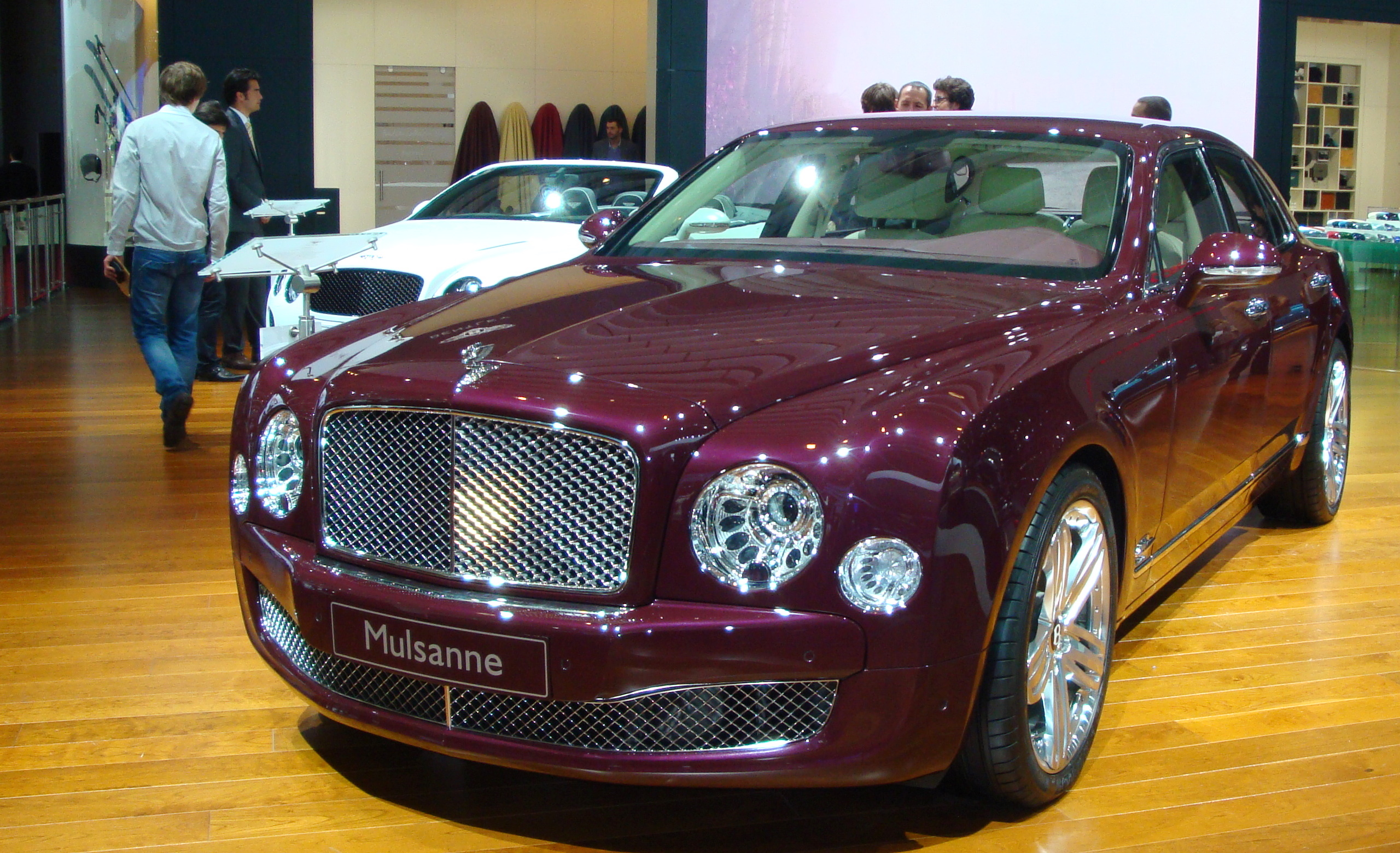 Bentley Mulsanne 2010 salon de paris